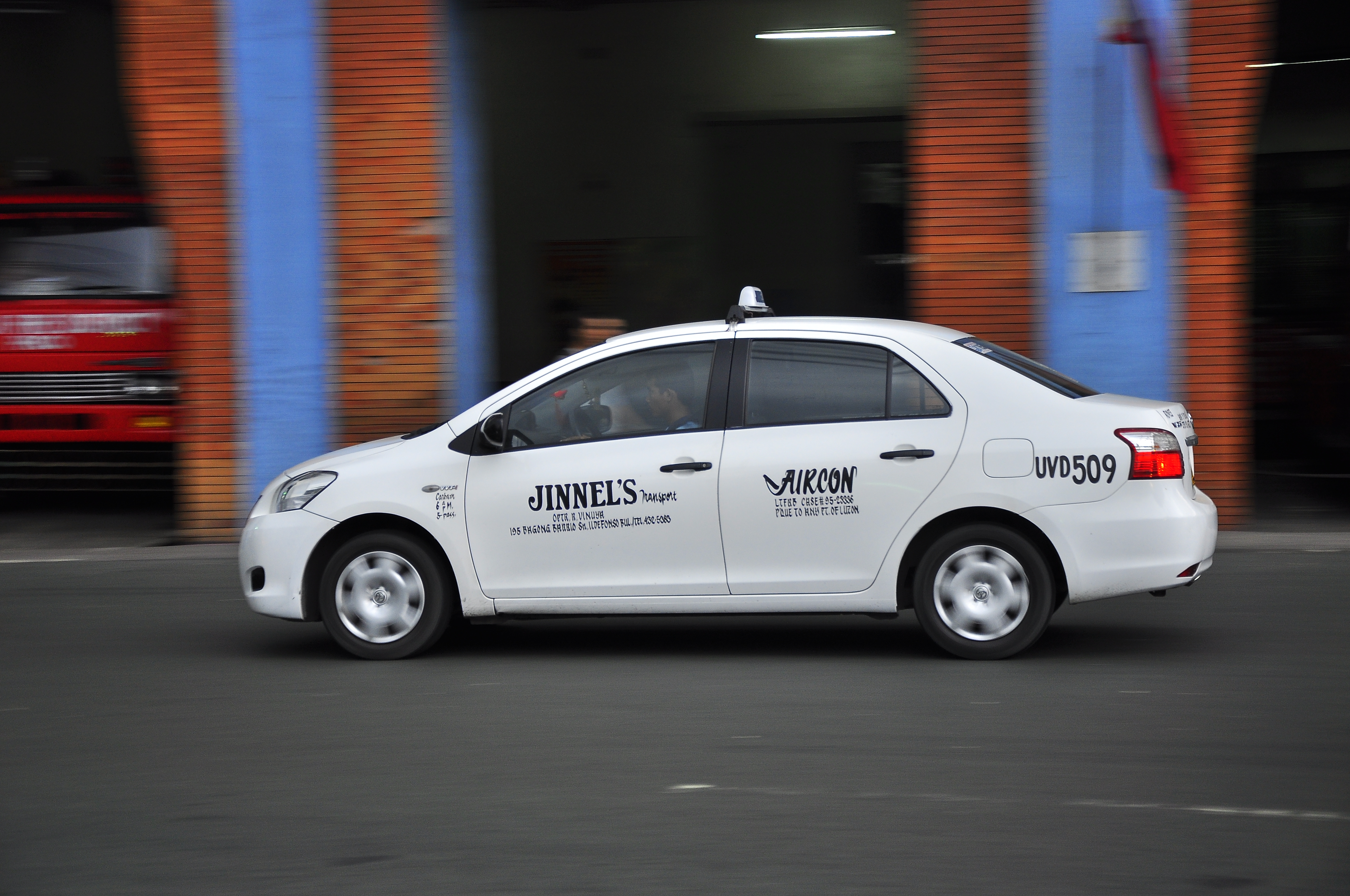 White taxicab in Manila, Philippines